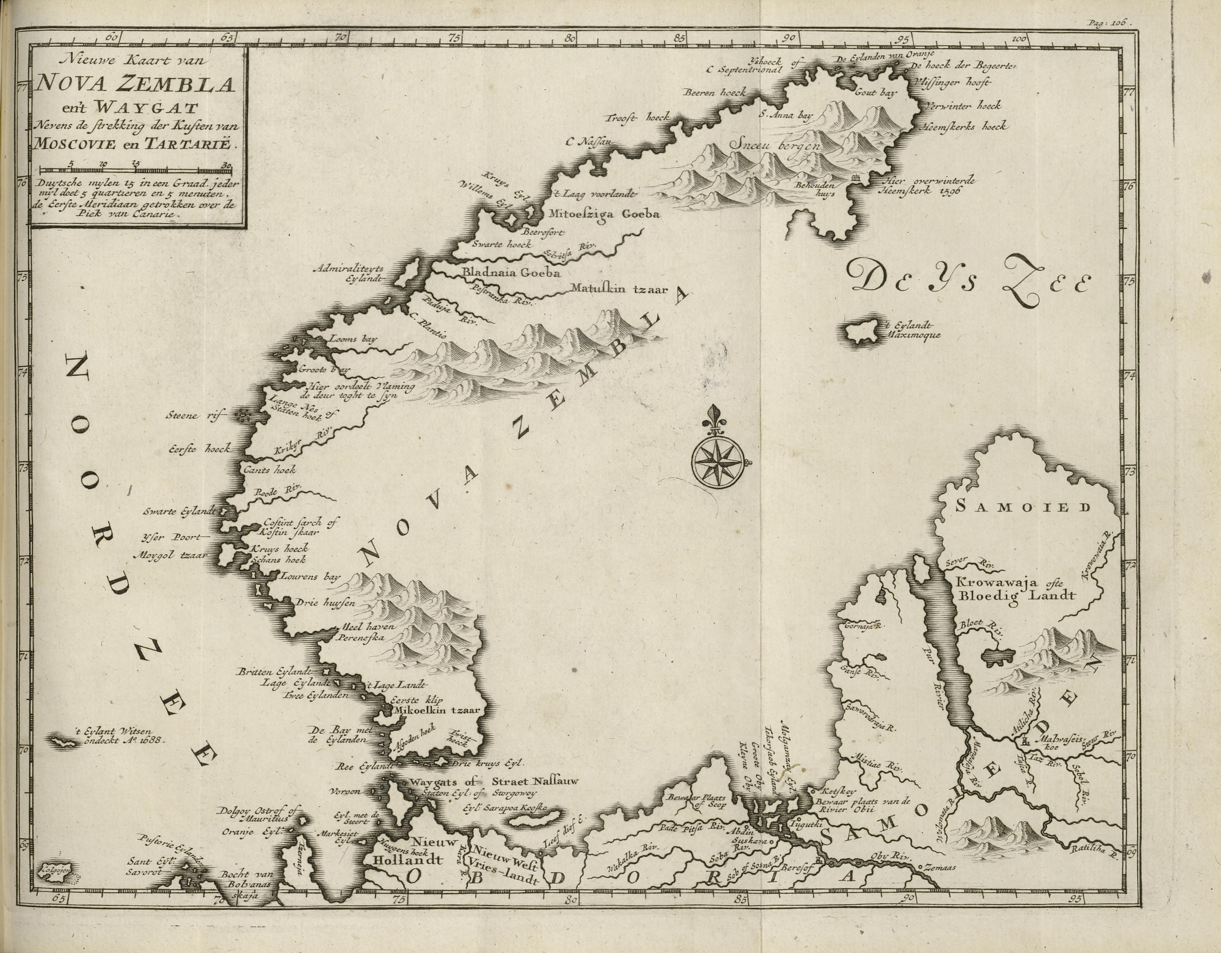 Illustrasjon hentet fra boken "C.G. Zorgdragers Bloeyende opkomst der aloude en hedendaagsche Groenlandsche visschery" av Zorgdrager, Cornelis Gijsbertsz og utgitt av By Joannes Oosterwyk (nl, 1720)